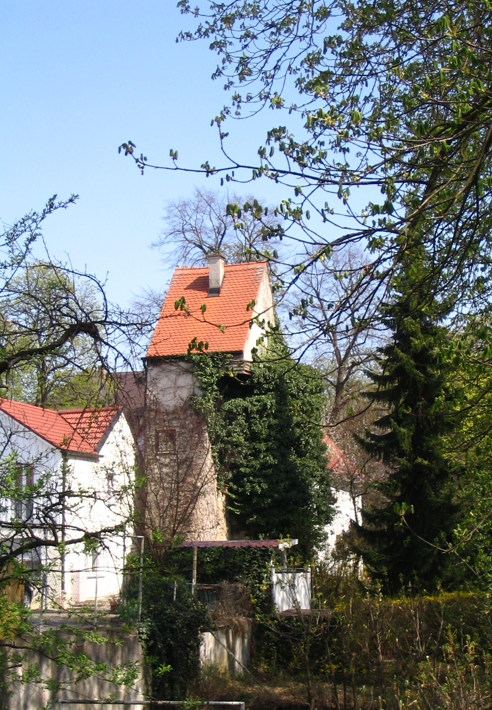 Lugausturm - ehemaliger Teil der Stadtbefestigung Neustadt an der Donau